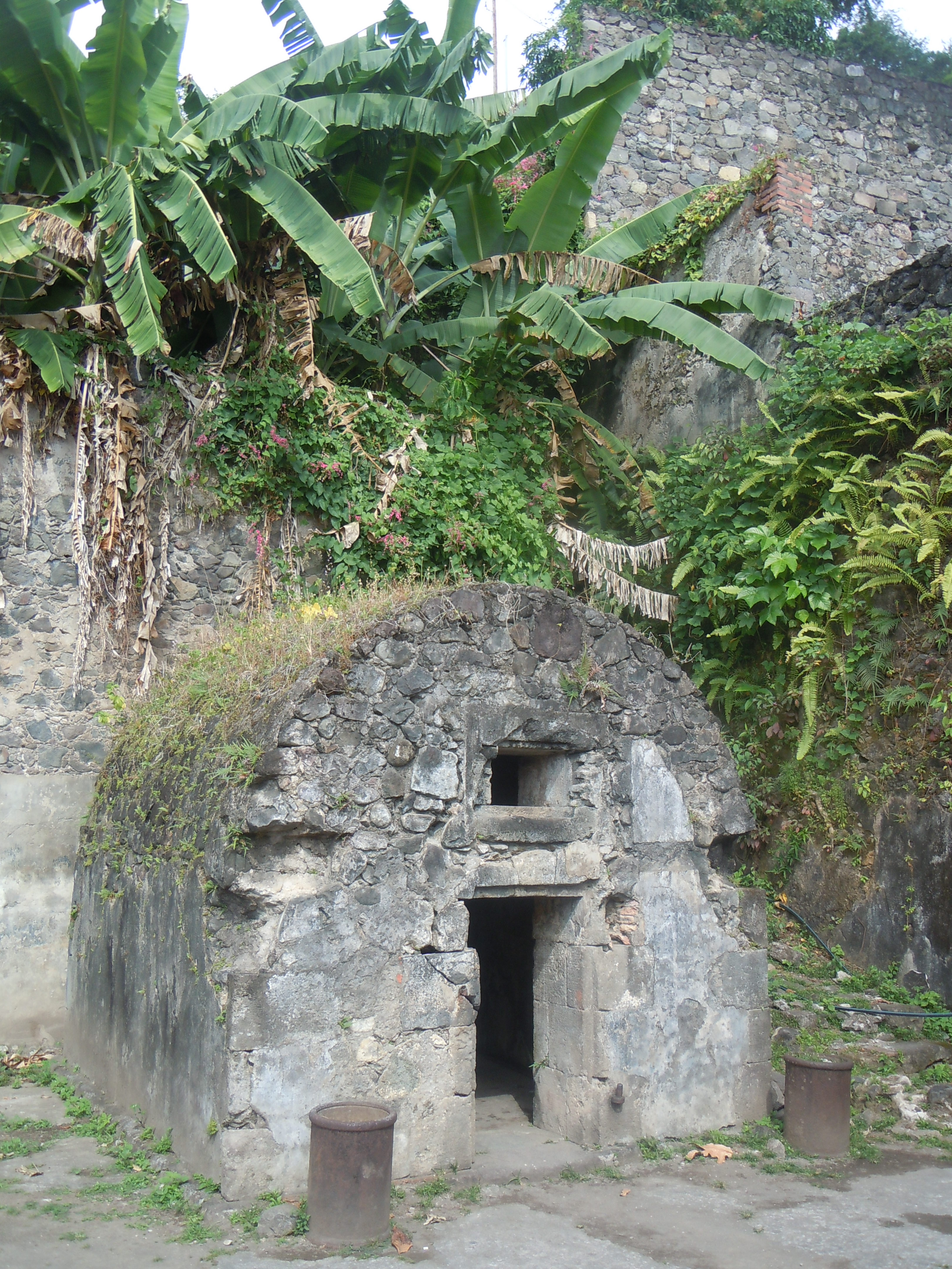 Cachot de Cyparis, Saint-Pierre, Martinique. .